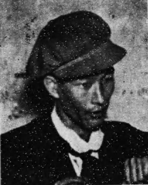 貘 與太平、1921年の写真